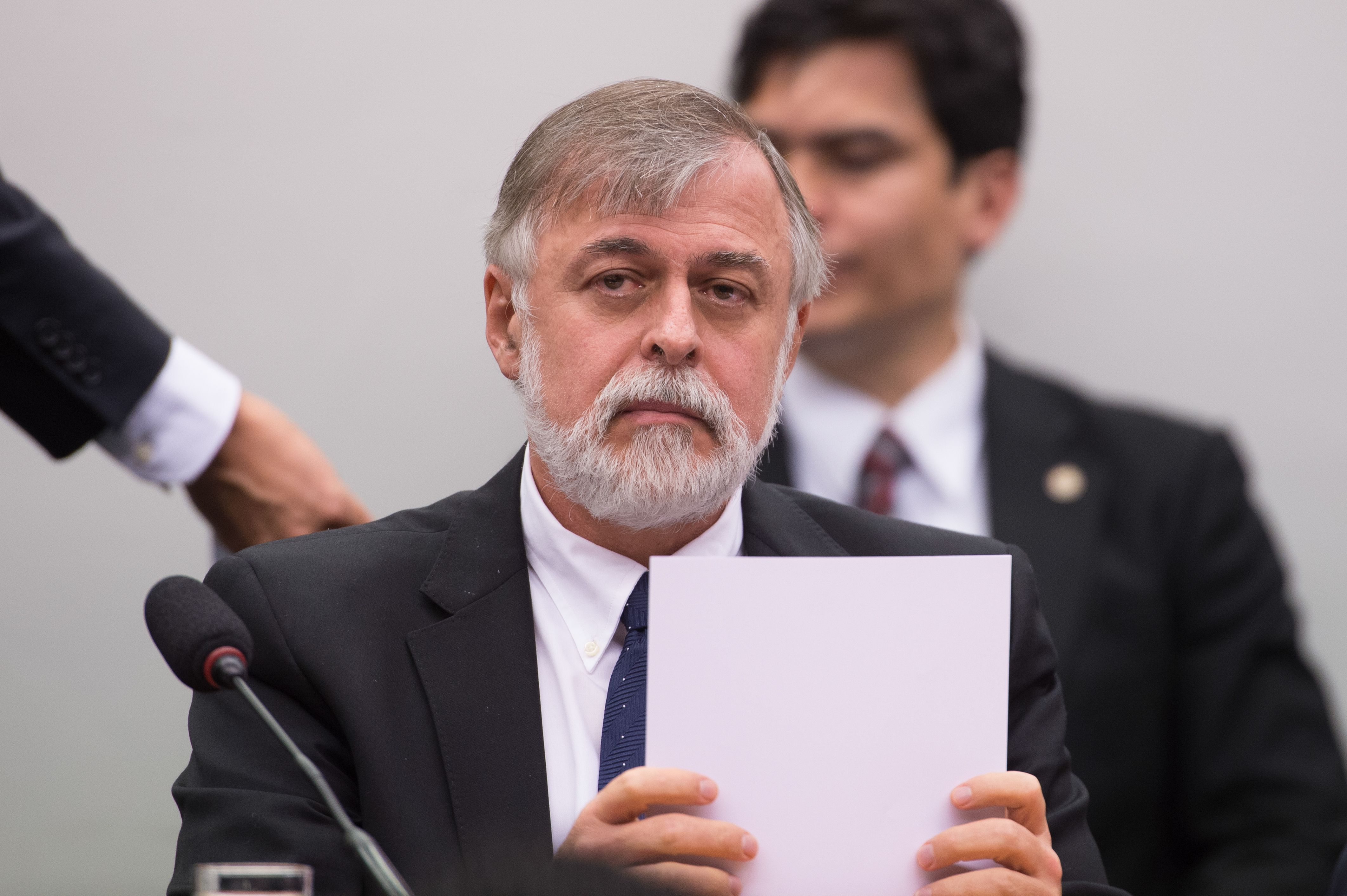 Depoimento do ex-diretor de Abastecimento da Petrobras, Paulo Roberto Costa, na Comissão Parlamentar de Inquérito (CPI) da Petrobras, na Câmara dos Deputados.